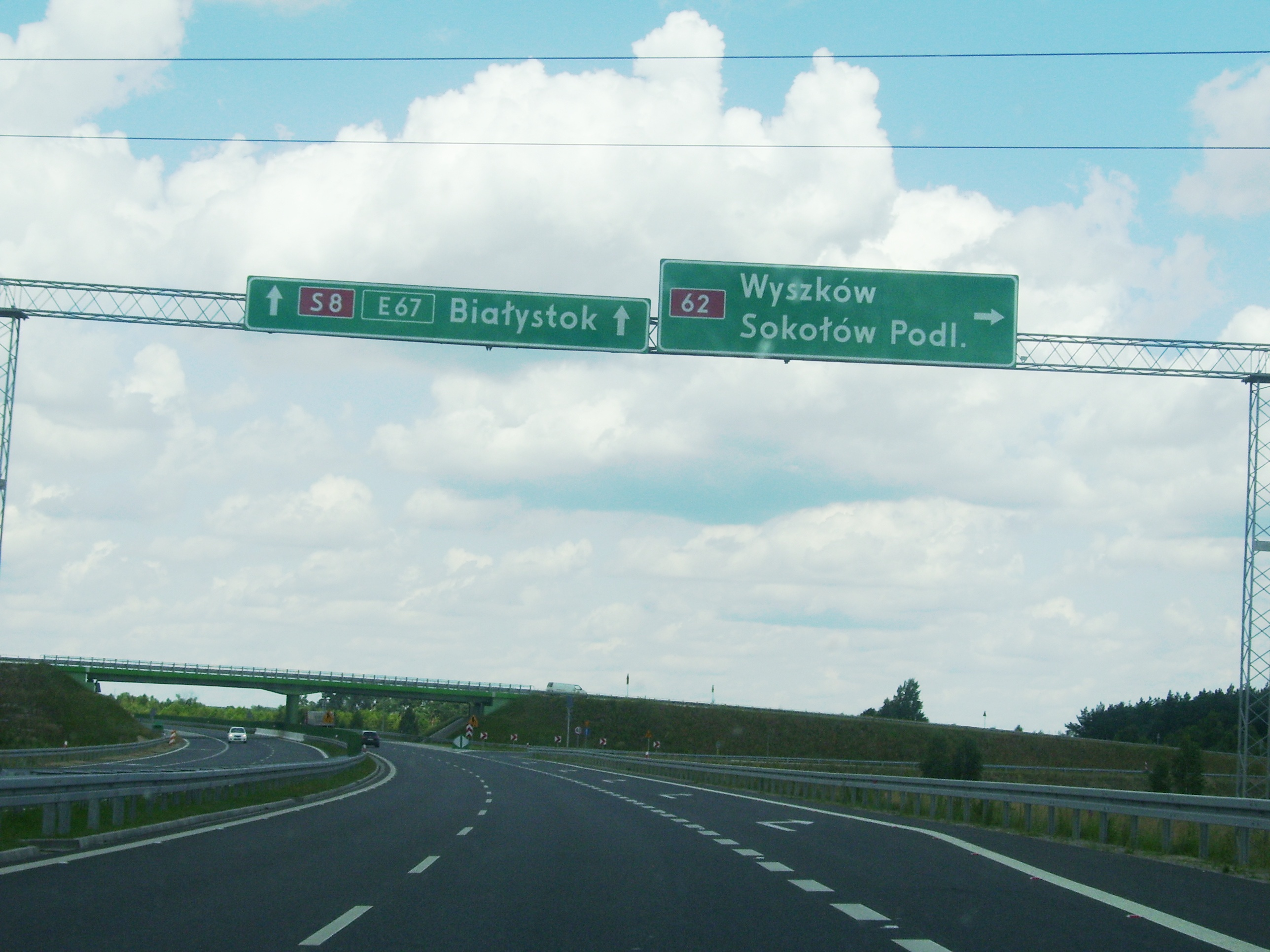 DK8 (Poland) Drogowskazy informujące o zjeździe na węźle Skuszew - Obwodnica Wyszkowa